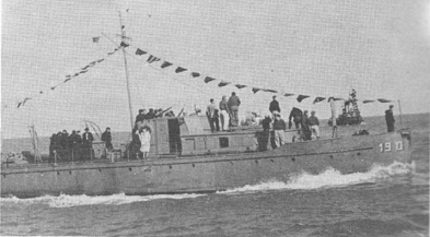 ספינת משמר אח"י פלמ"ח